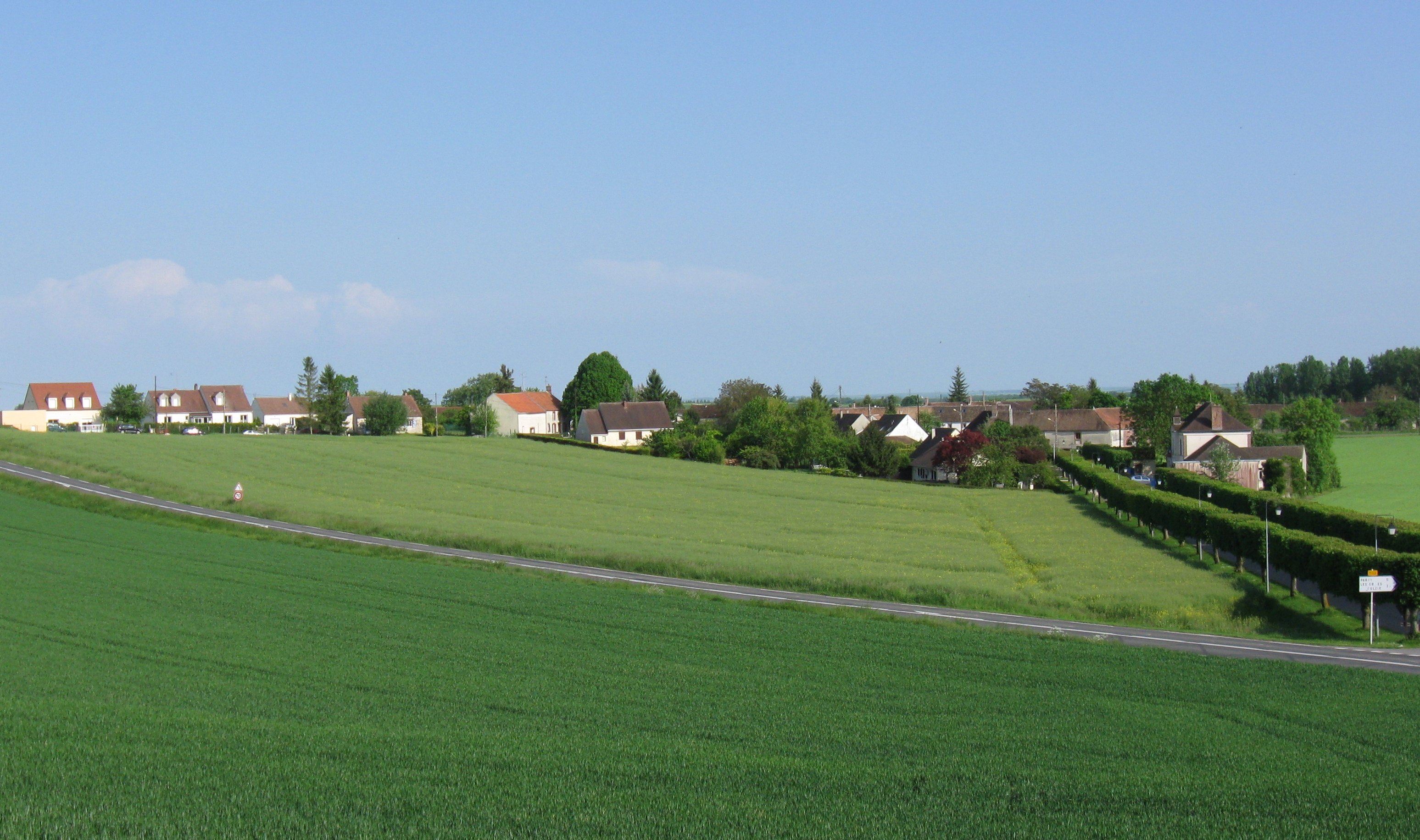 Village de Paroy. (Seine-et-Marne, région Île-de-France).